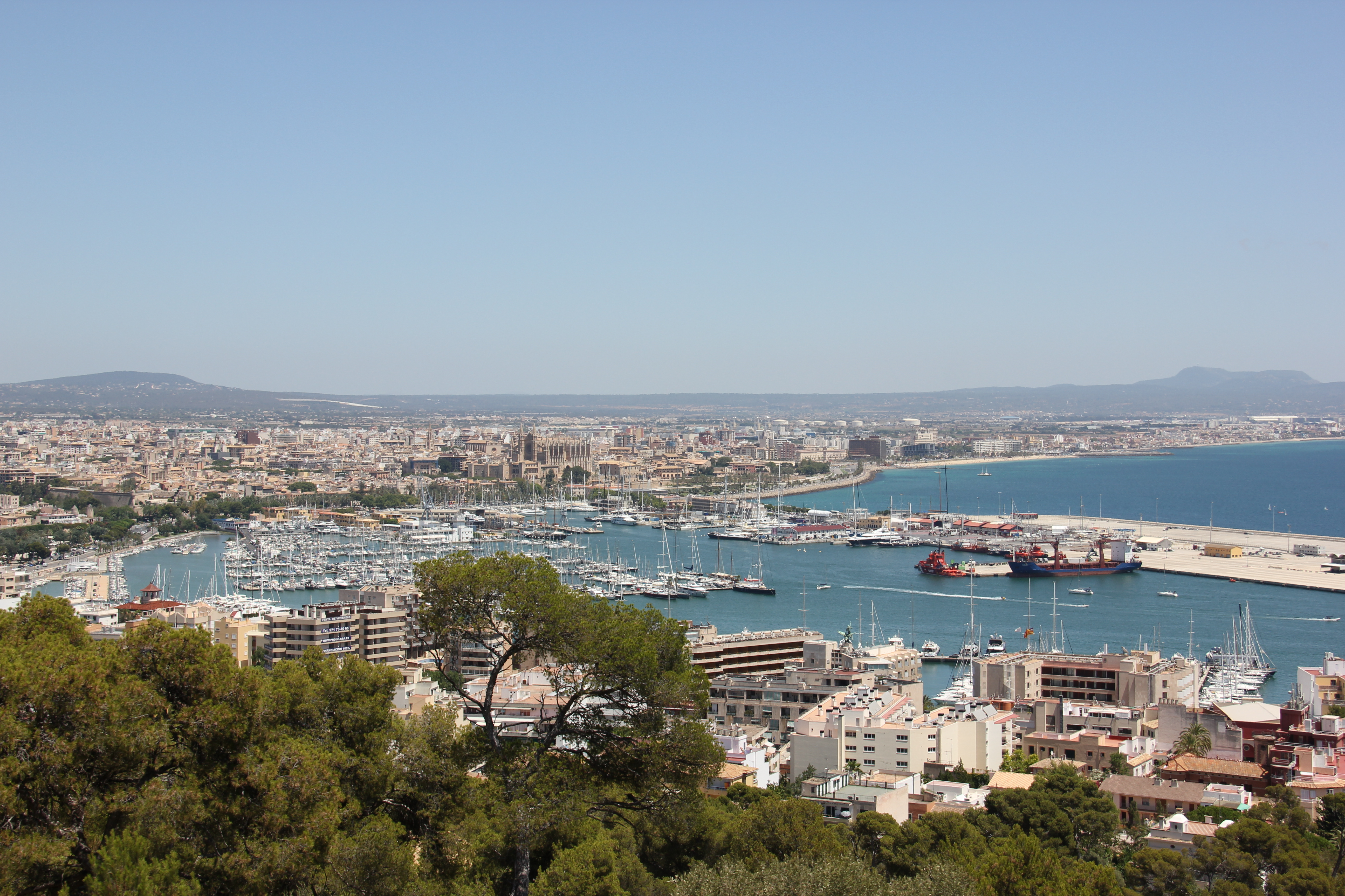 Palma de Mallorca